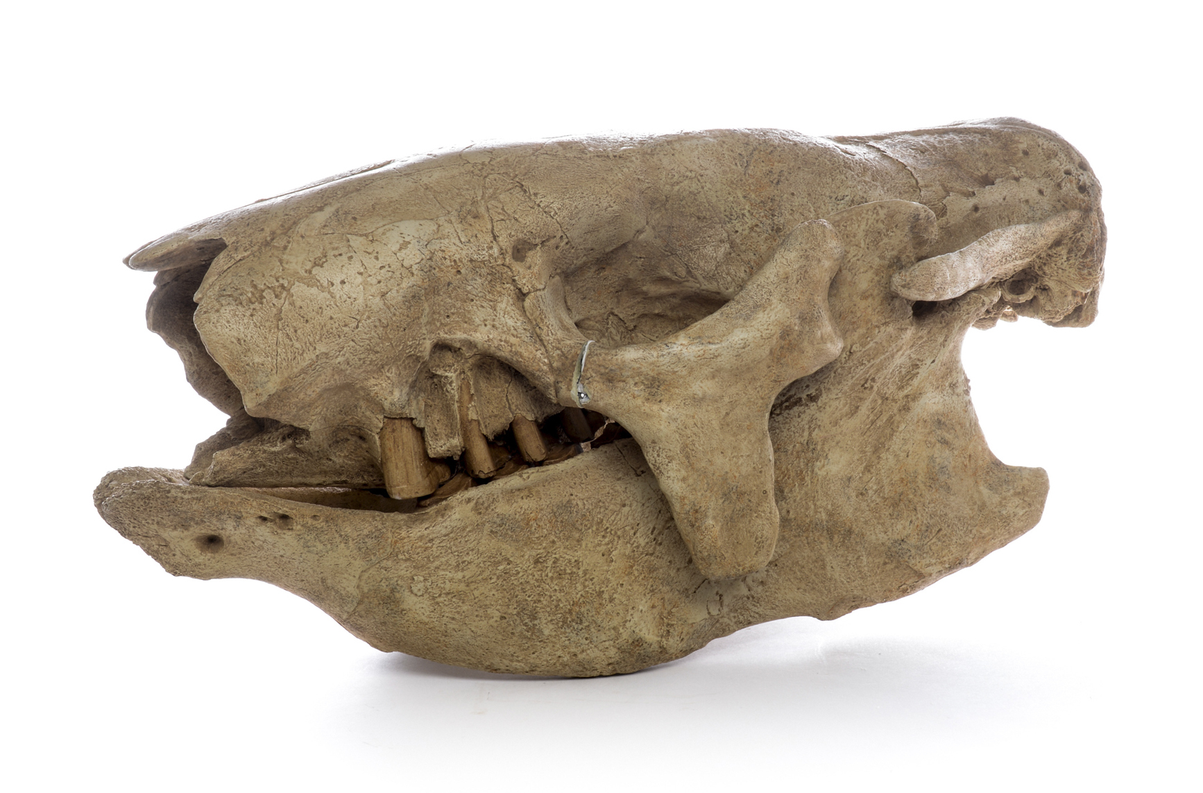 Cranio. Replica.